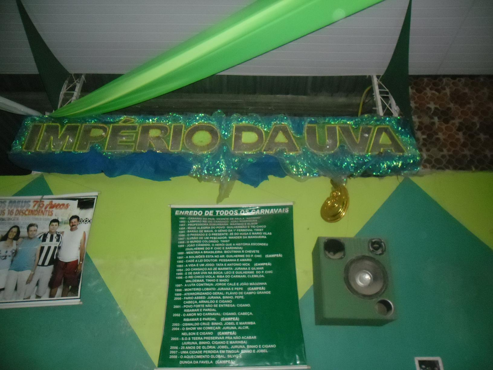 Painel na quadra do GRES Império da Uva com a lista de todos os enredos e os respectivos compositores dos sambas.